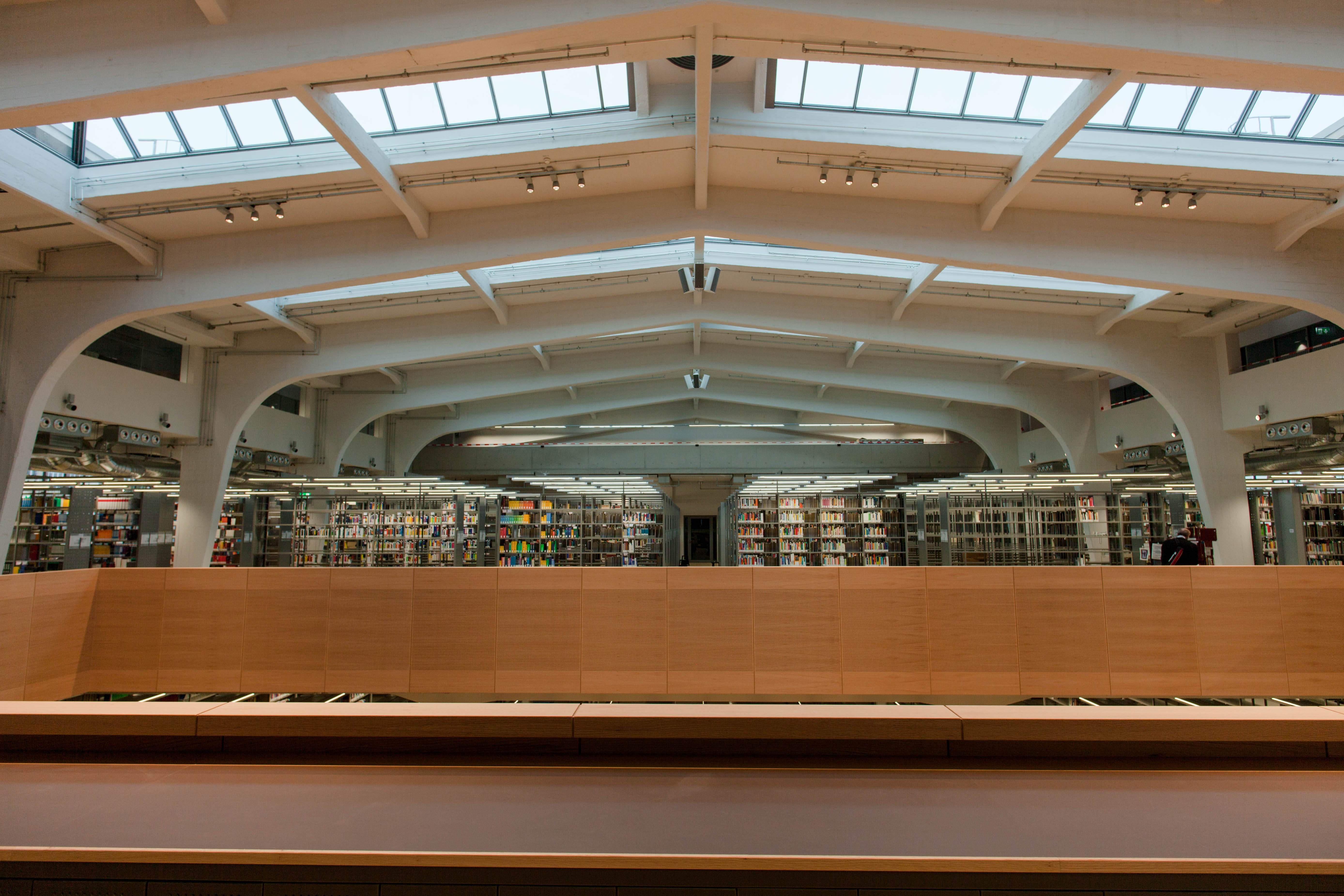 Die Bibliothek der Hochschule Düsseldorf im Alten Schlachthof in Düsseldorf-Derendorf